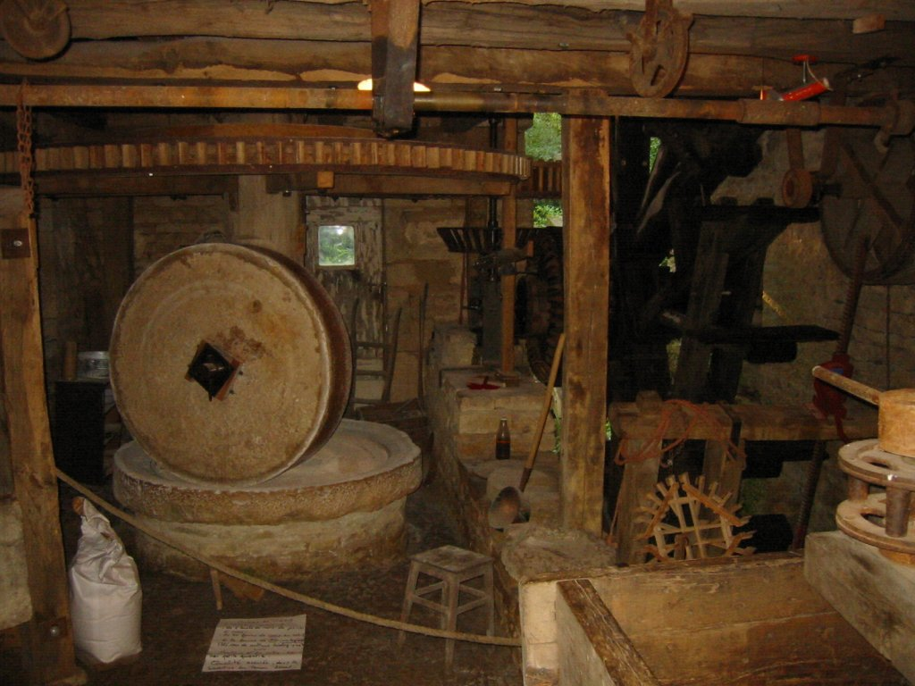 Ancien moulin à huile (Haute Saone 70 - Franche Comté - France)